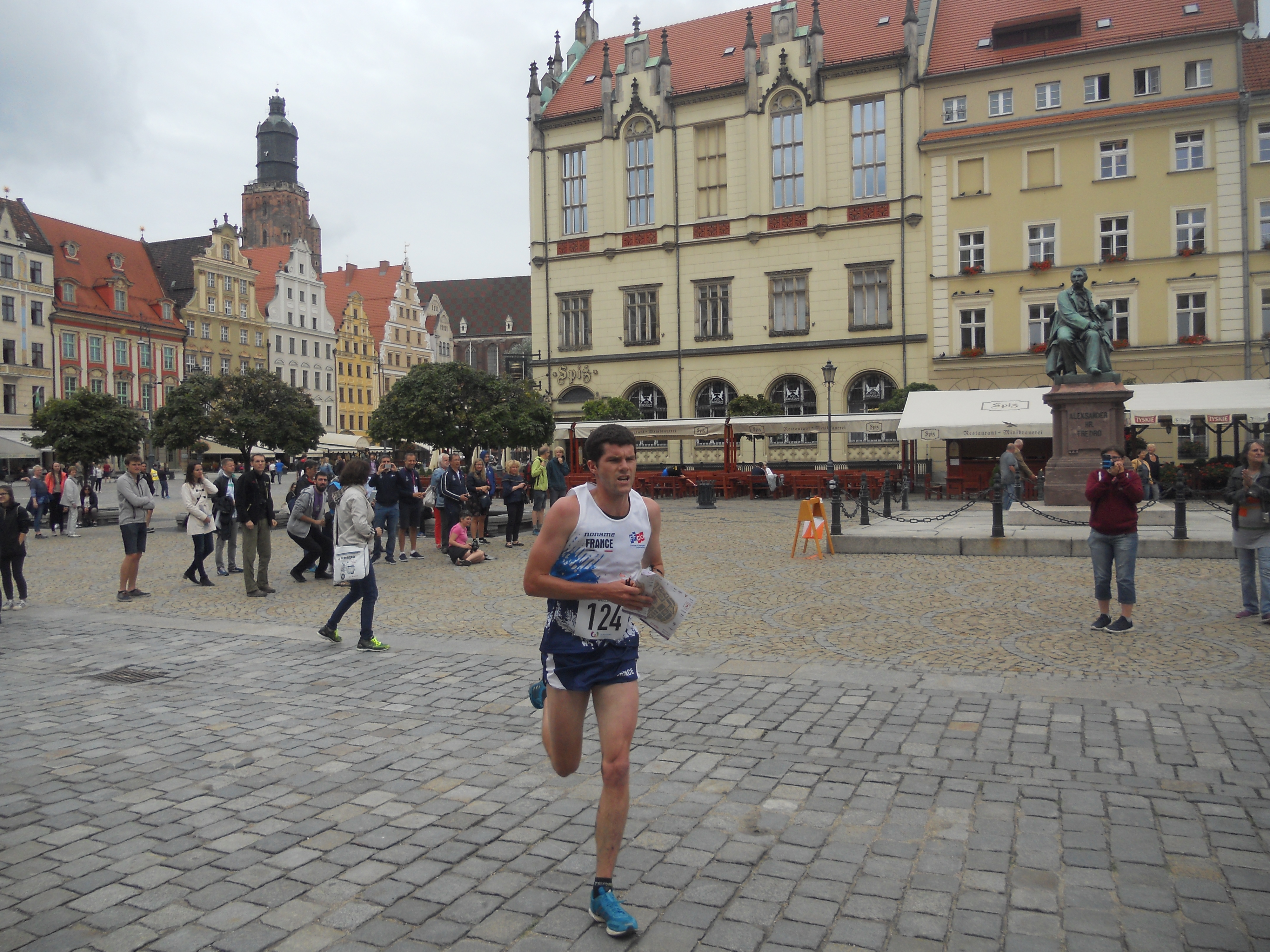 Сусветныя гульні 2017 - Арыентаванне Спрынт - Лукас Басет